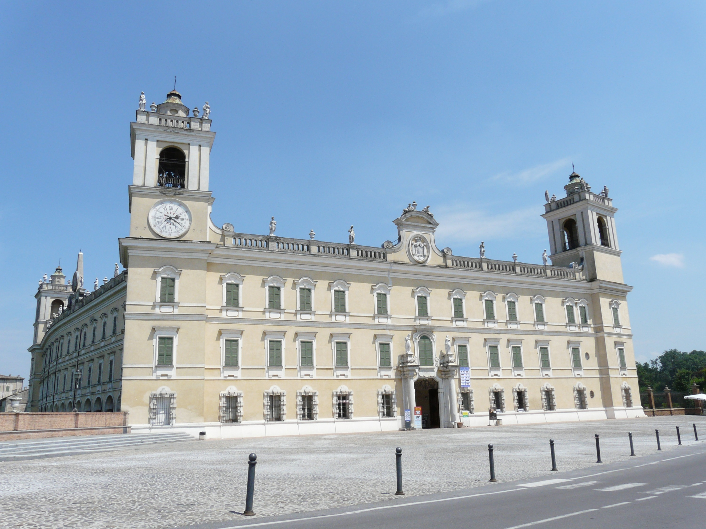 Immagini della Reggia di Colorno, Emilia-Romagna, Italia